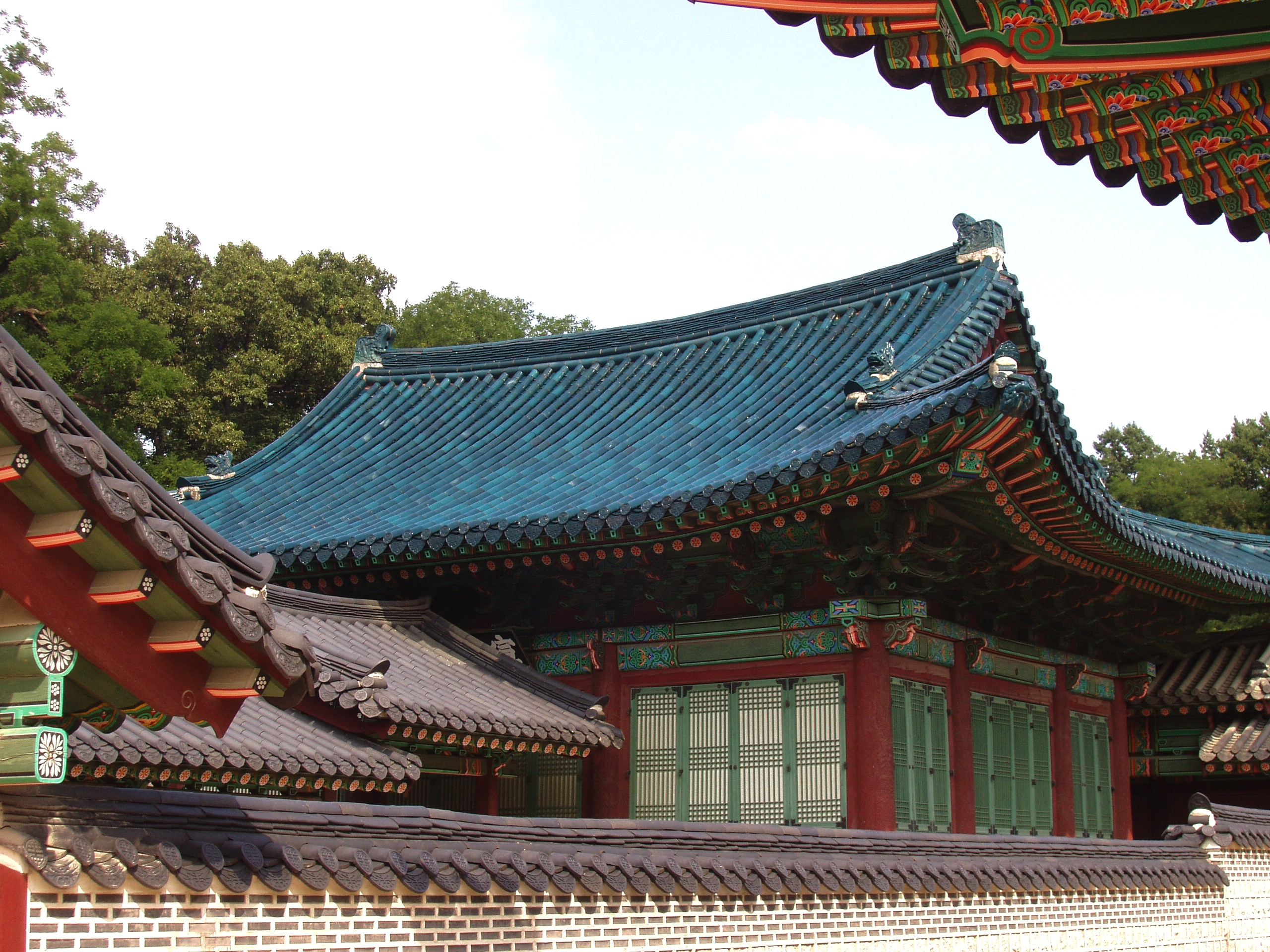 Seonjeongjeon, Changdeokgung - Seoul, Korea.